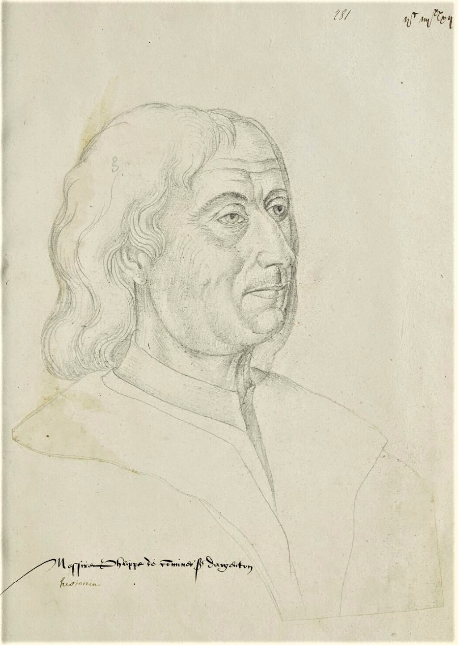 Portrait à la sanguine de Philippe de Commynes dans le Recueil d'Arras (Bibliothèque municipale d'Arras).